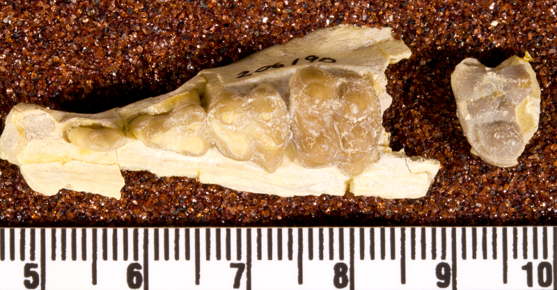 Perchoerus minor Cook